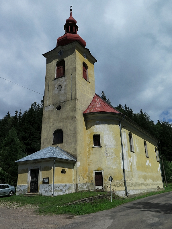 Kostel svatého Josefa Kalasánského, v obci, Moravský Karlov.